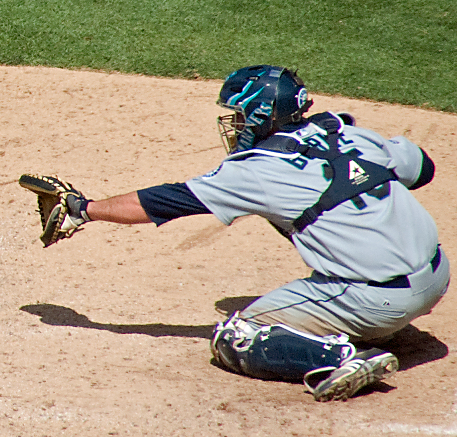 Jamie Burke